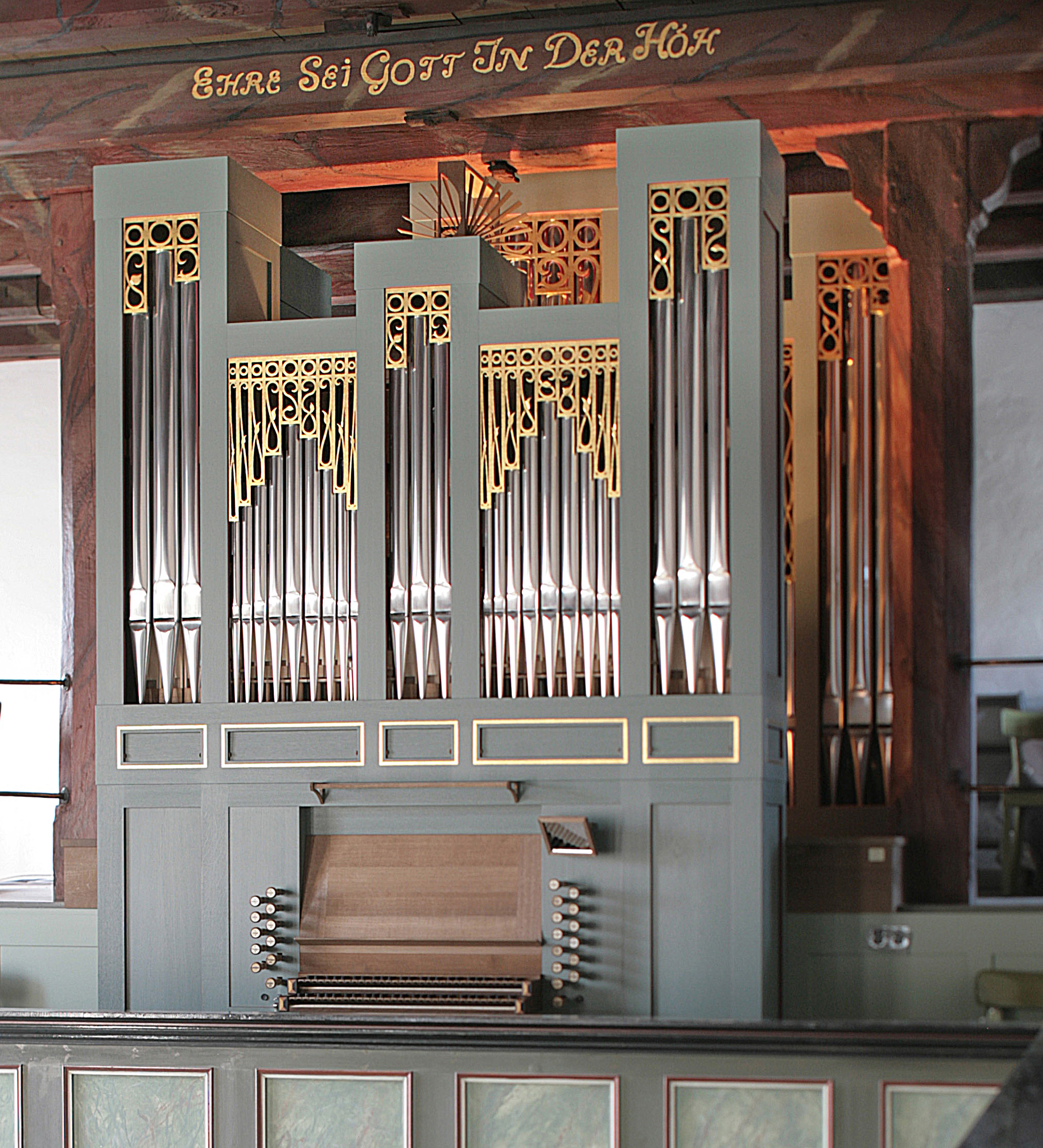 Orgel der Bergstedter Kirche in Hamburg-Bergstedt, Deutschland